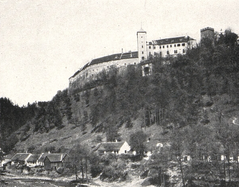 Bítov (zaniklá obec)